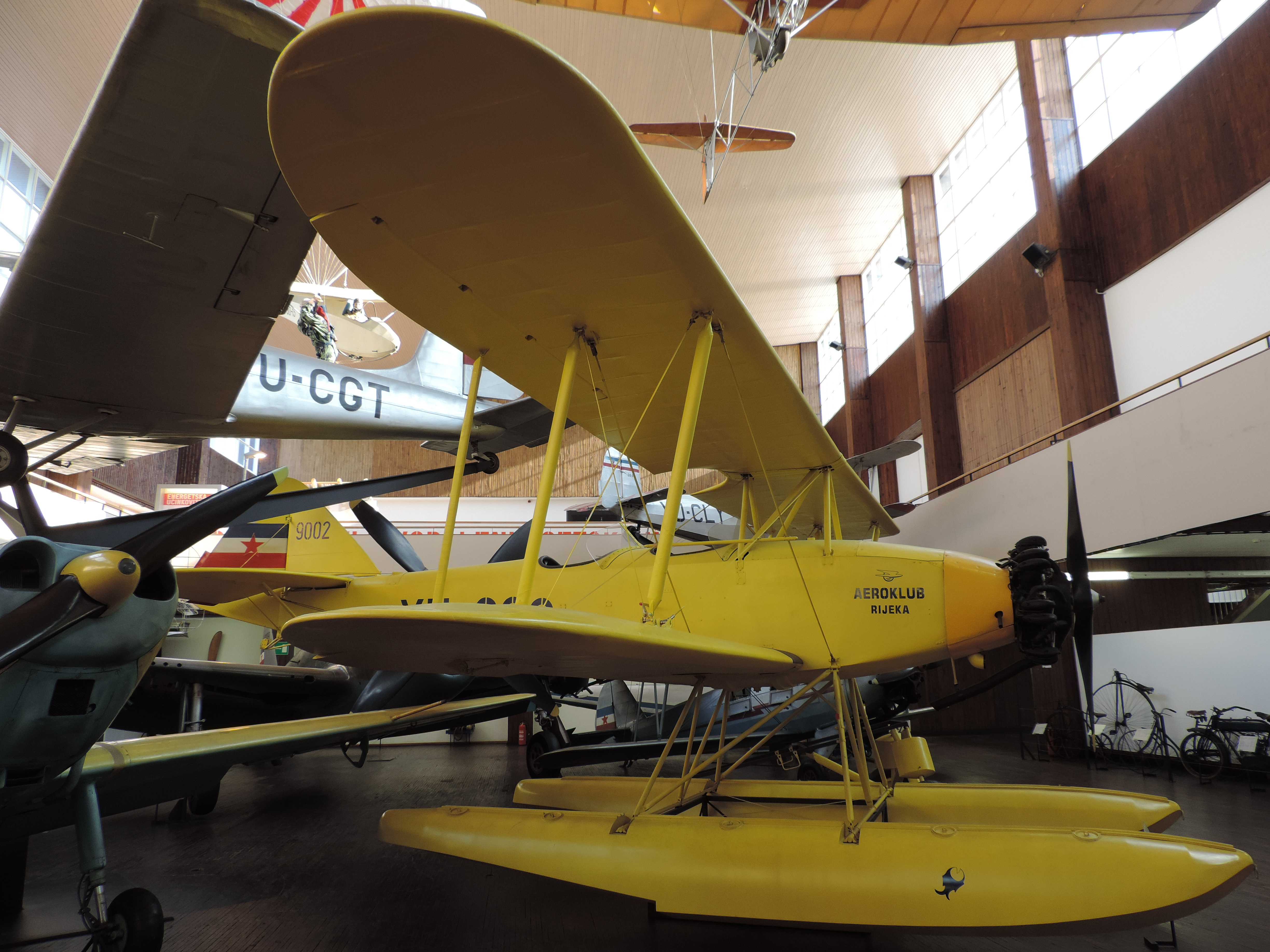 Znaj Fizir FN – Walter im Tehnicki Muzej Zagreb